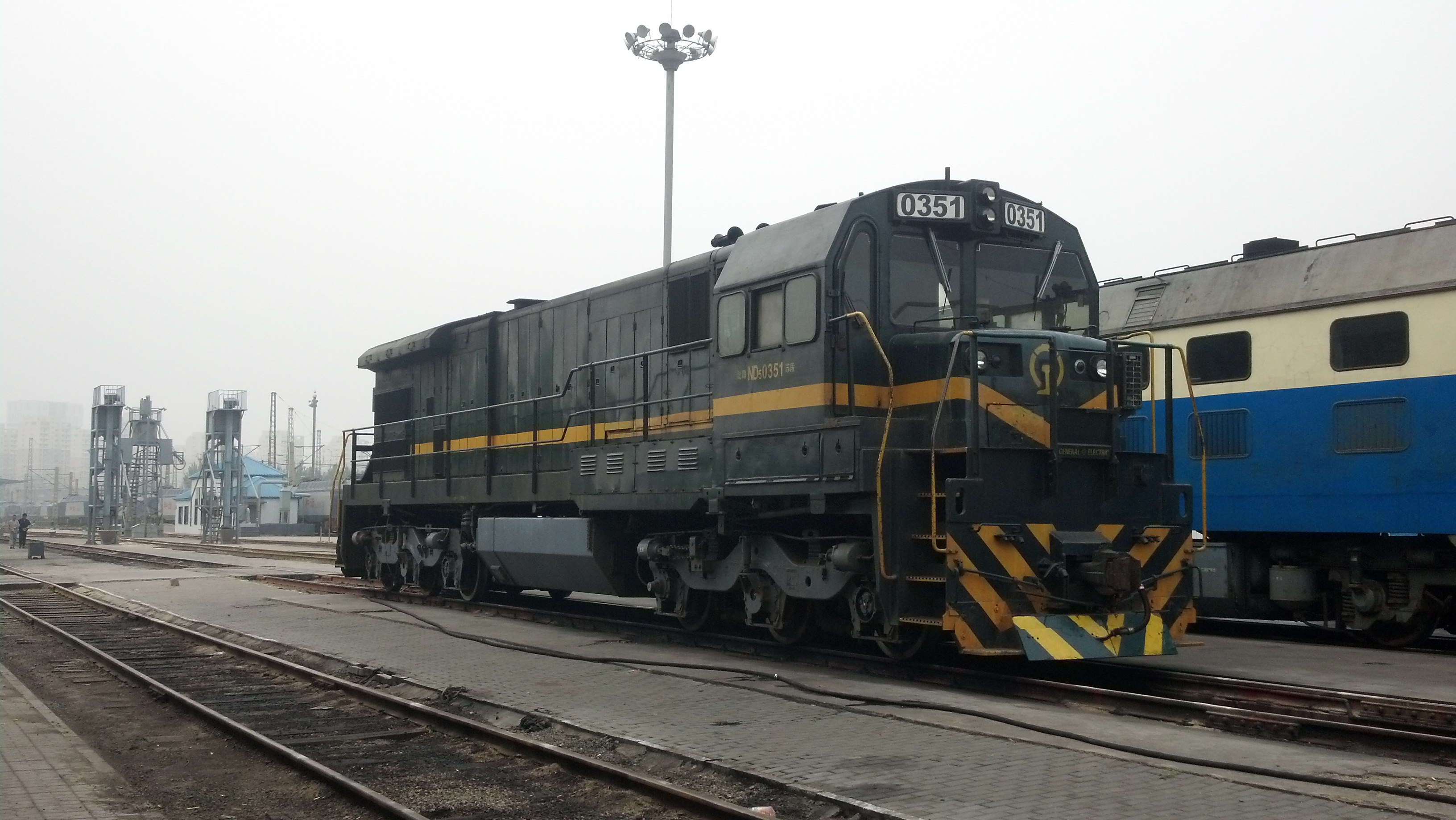 配属沈阳铁路局苏家屯机务段